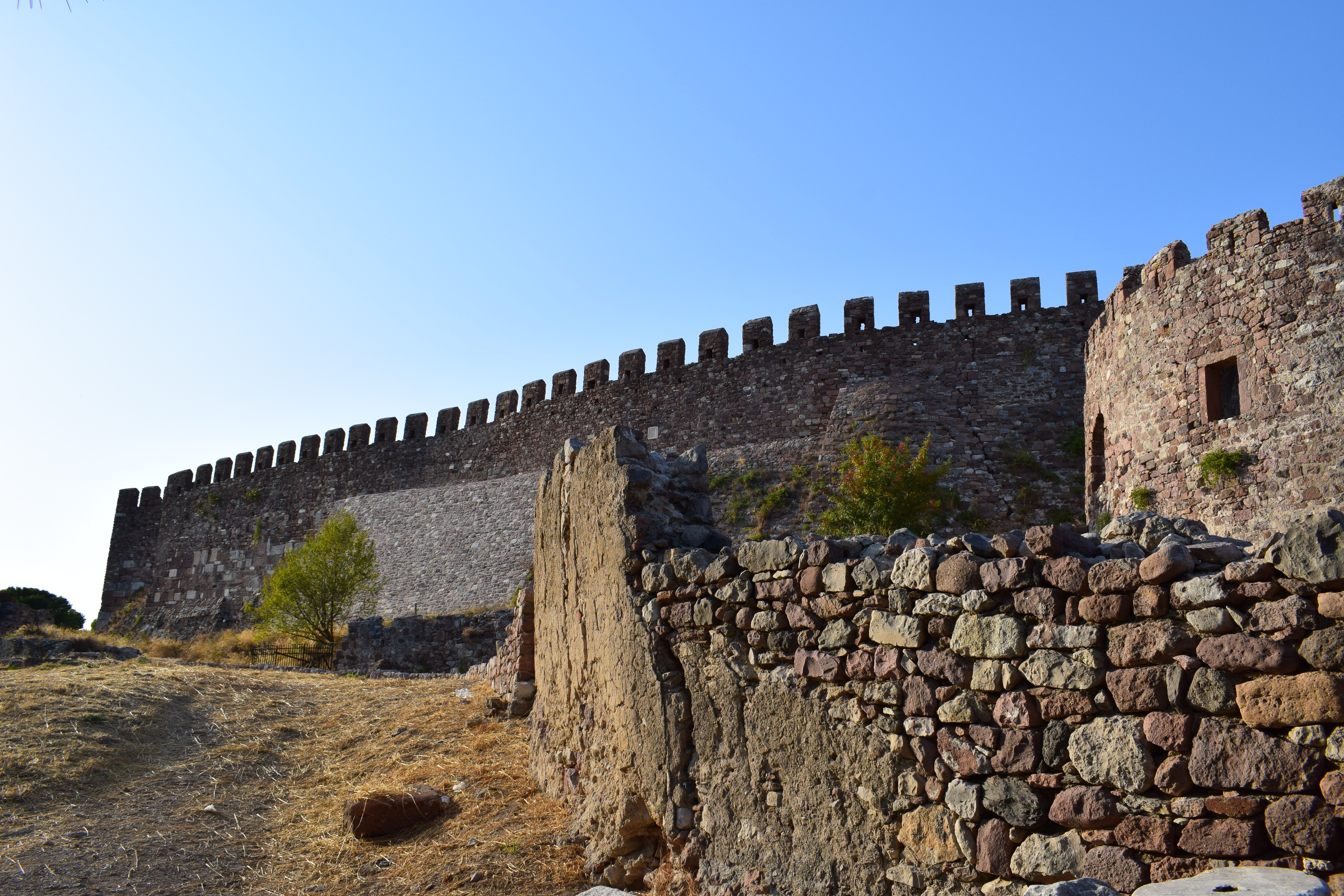 Κάστρο Μυτιλήνης«Κάστρο Μυτιλήνης»